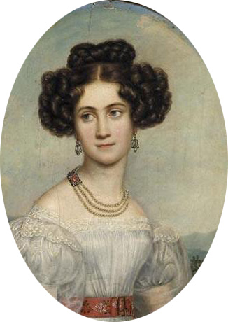 Portrait der Prinzessin Ludovika (1808-1892) von Bayern